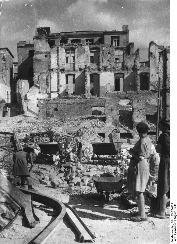 Berlin, Trümmerbeseitigung an der Humboldt-Universität Wiederaufbau an der Berliner Universität